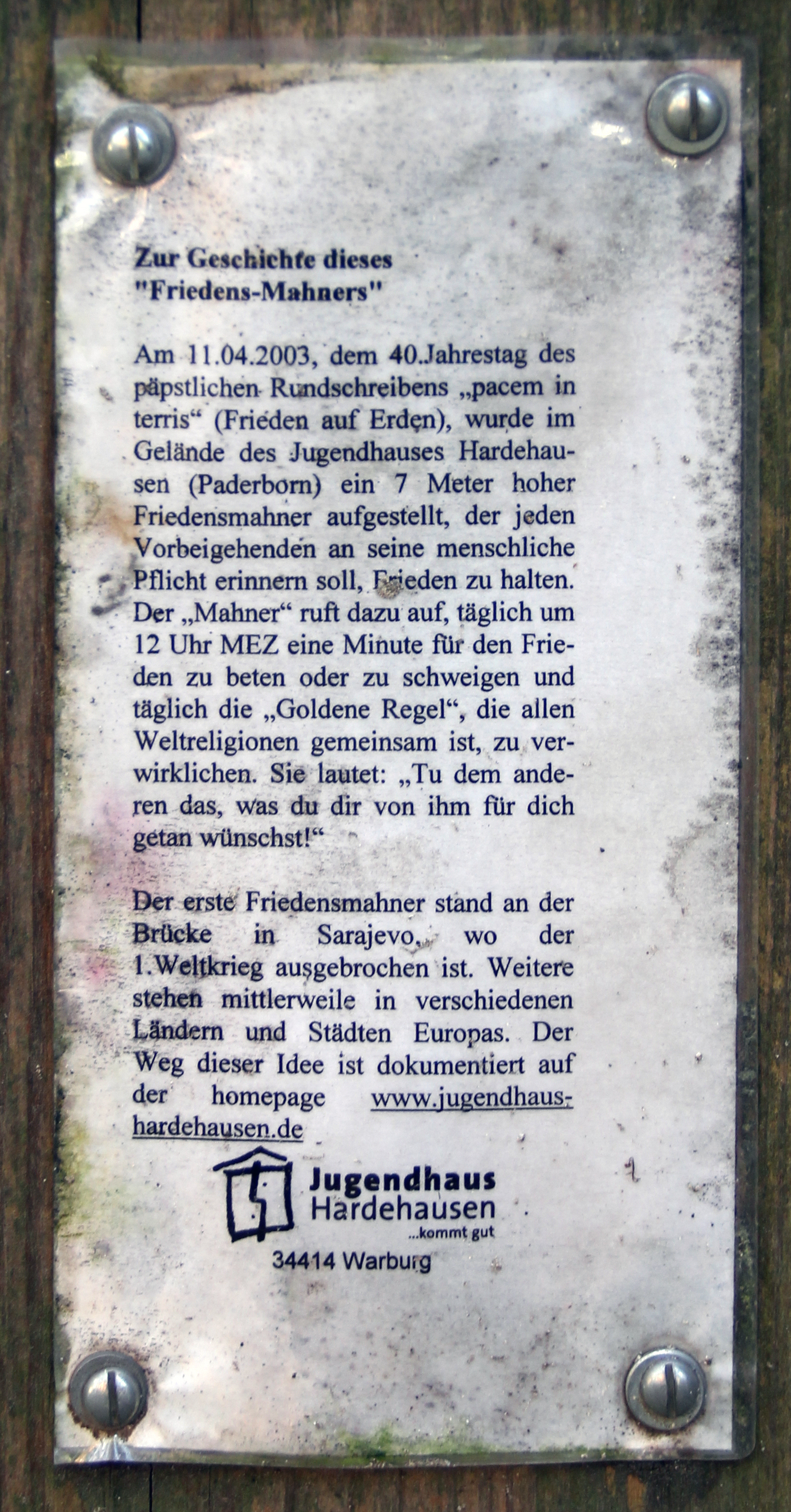 Gedenktafel, Friedens-Mahner, Fehrbelliner Straße 99, Berlin-Prenzlauer Berg, Deutschland